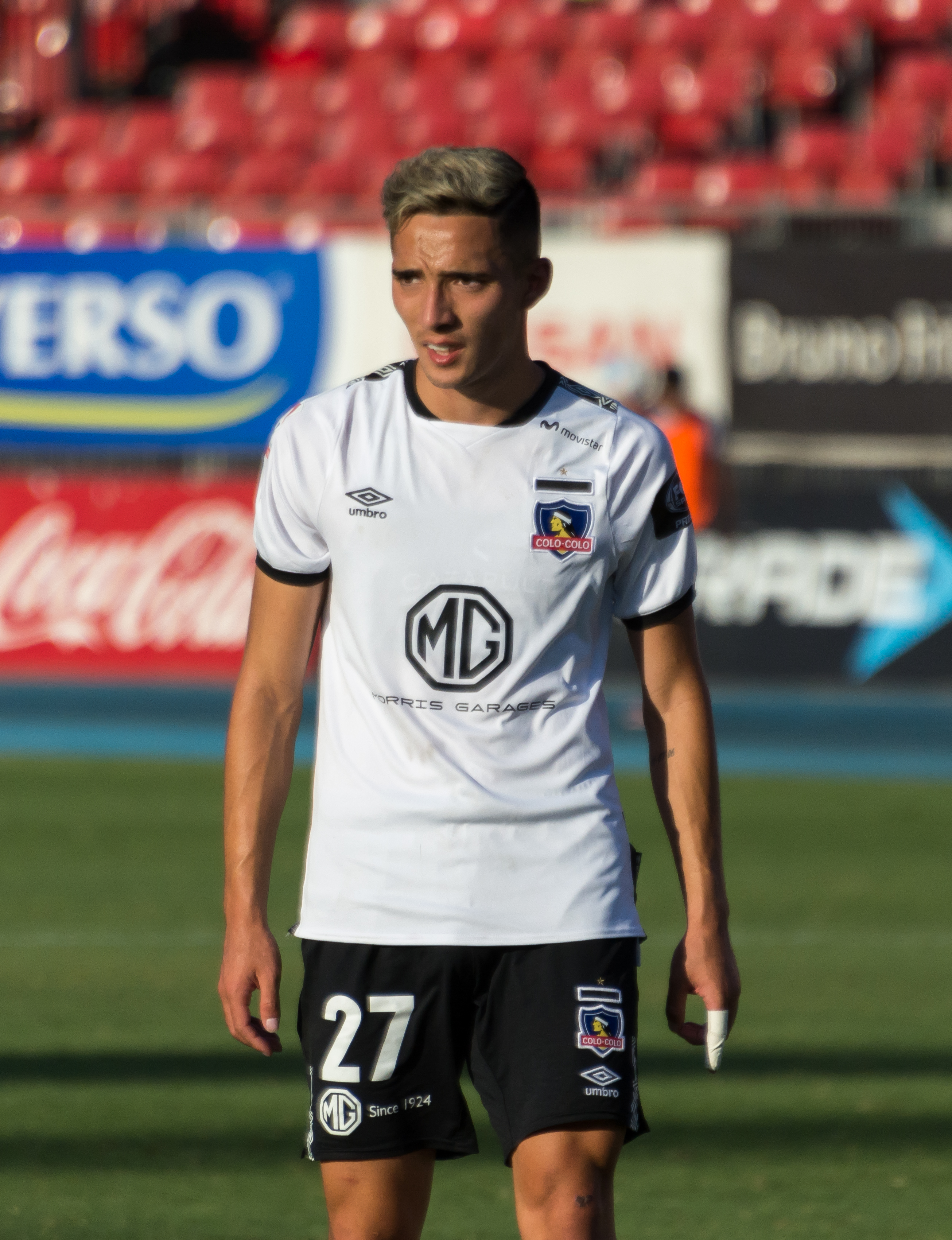 Audax Italiano v Colo-Colo, Estadio Nacional, Ñuñoa, Santiago, Región Metropolitana, Chile